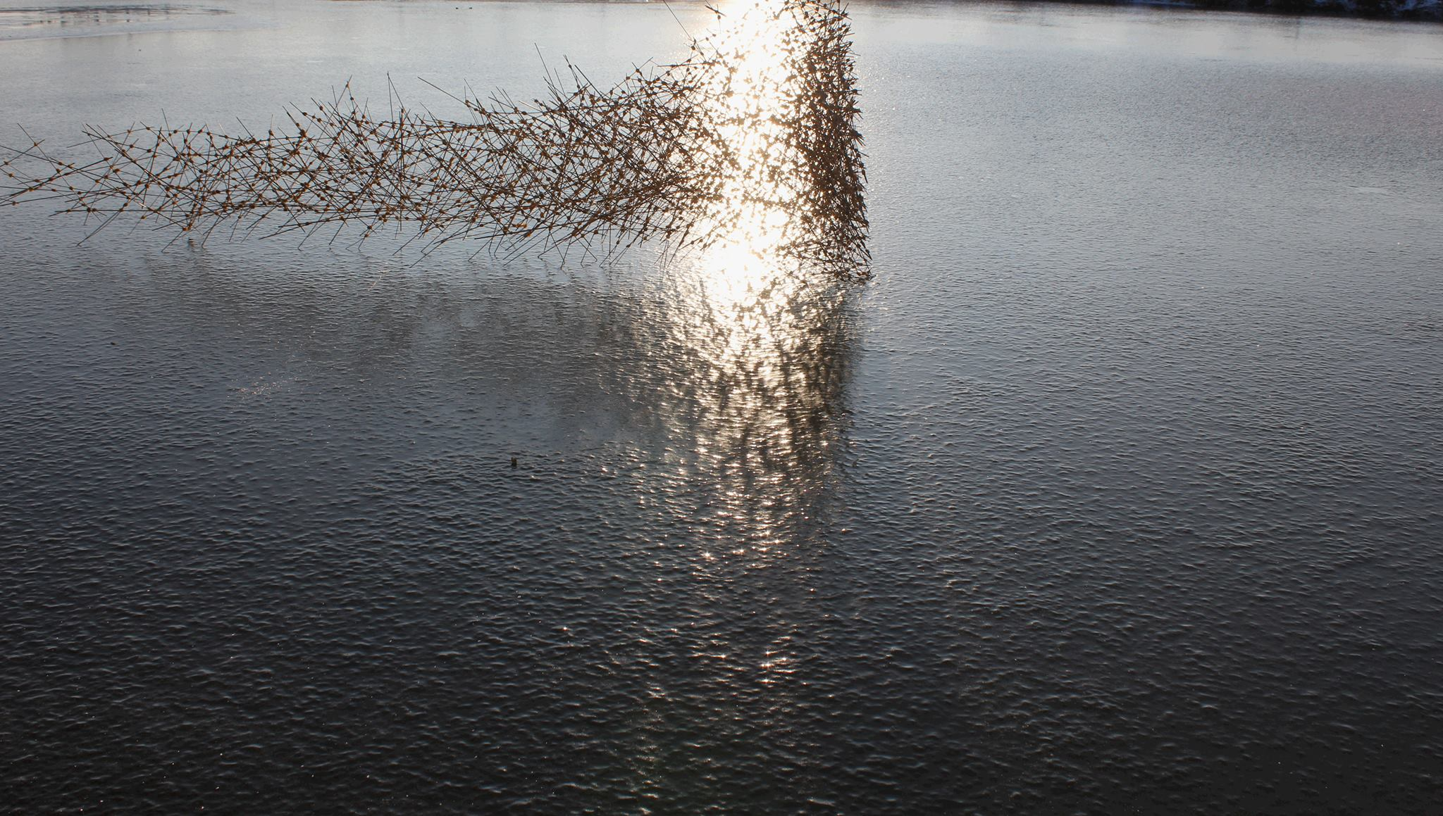 Praca Mirosława Maszlanko zatytułowana Iluminacje, wykonana z trawy - trzęślicy modrej i wosku, Marwica 2019.